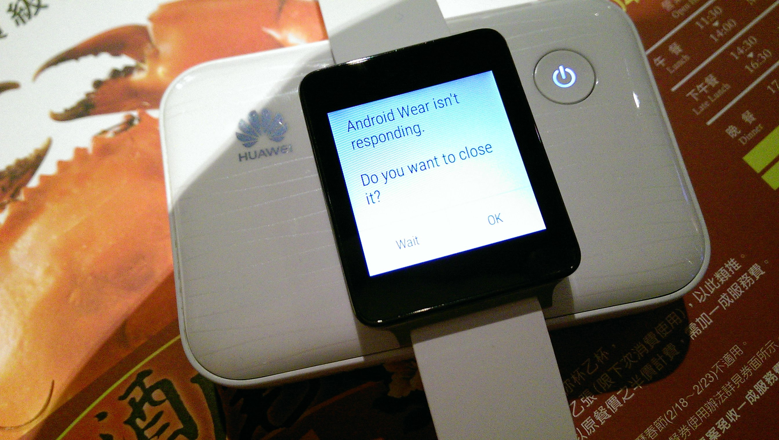 搭載 Android Wear 的 LG G Watch 裝置發生了無回應的錯誤訊息。